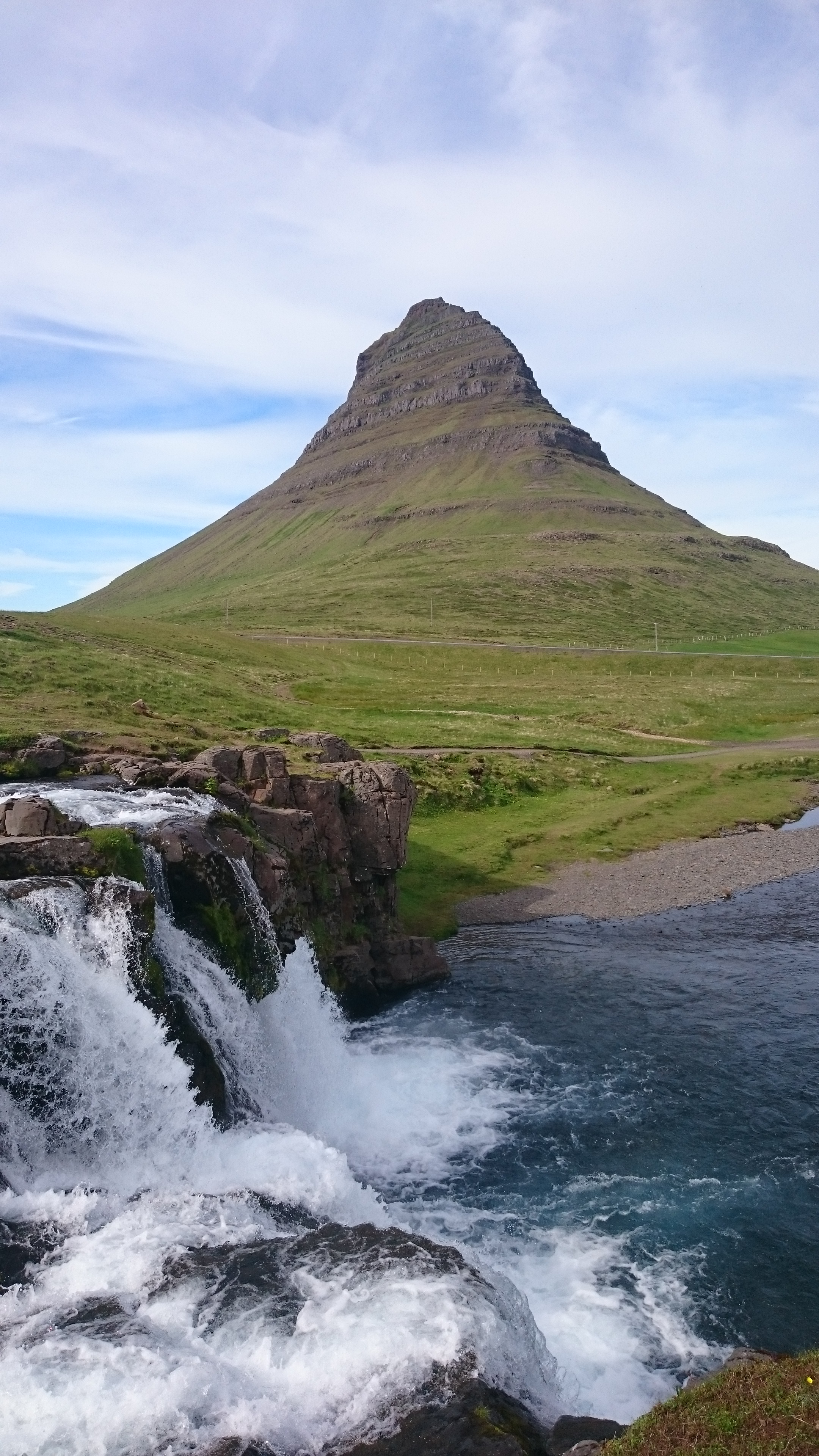 Kirkjufell mit Kirkjufellsfoss im Vordergrund